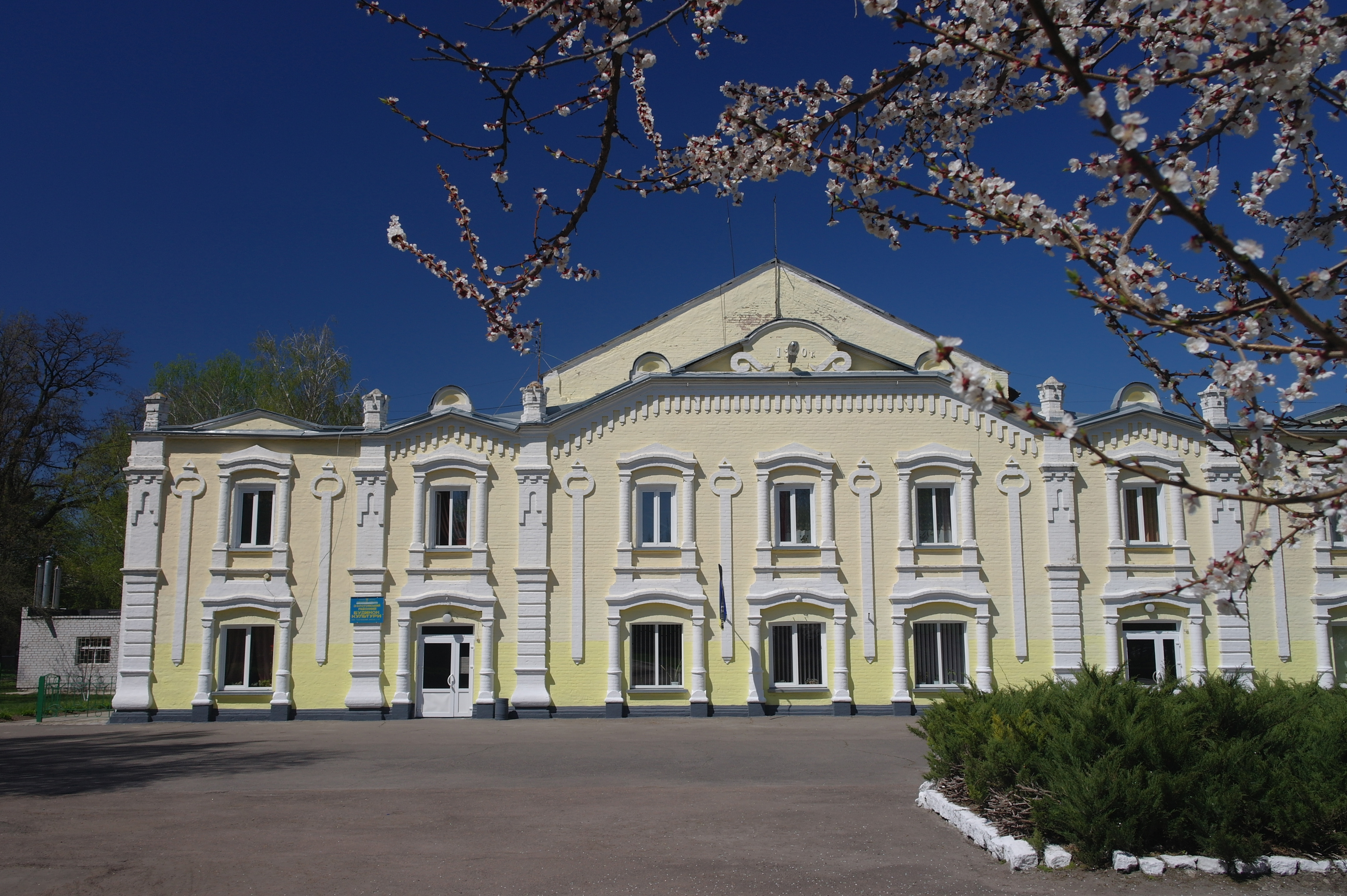 Золотоноша, повітовий театр